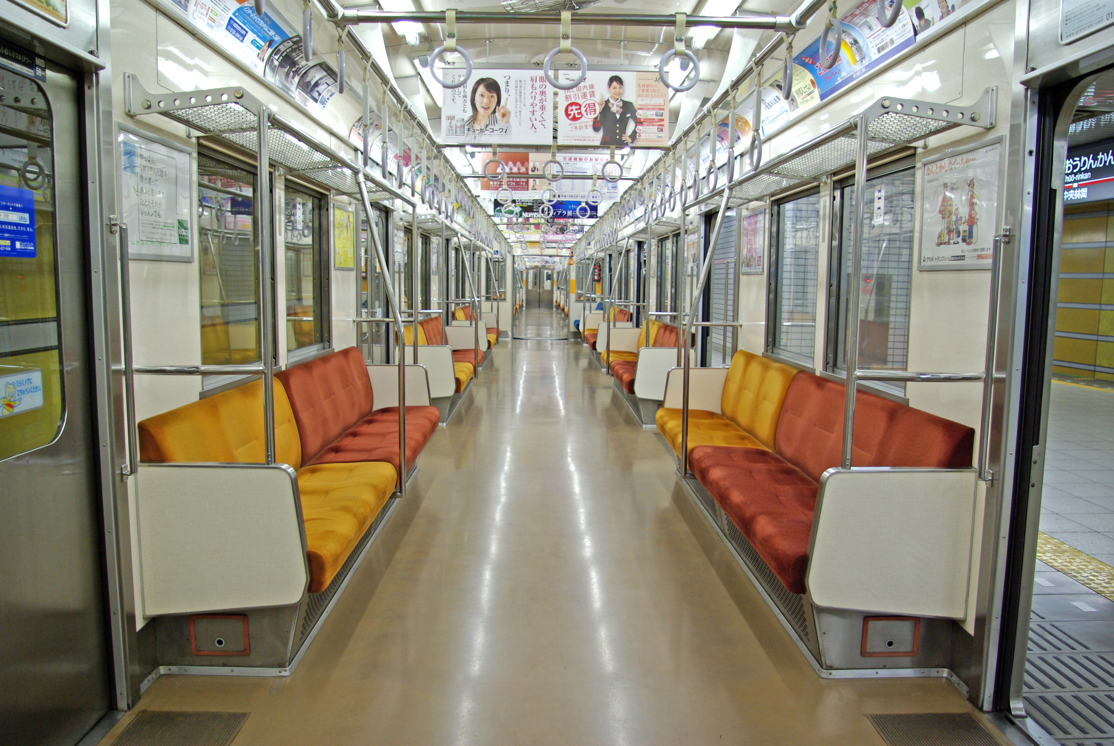 東急8500系 デハ8946号（12-2次車・更新車）車内